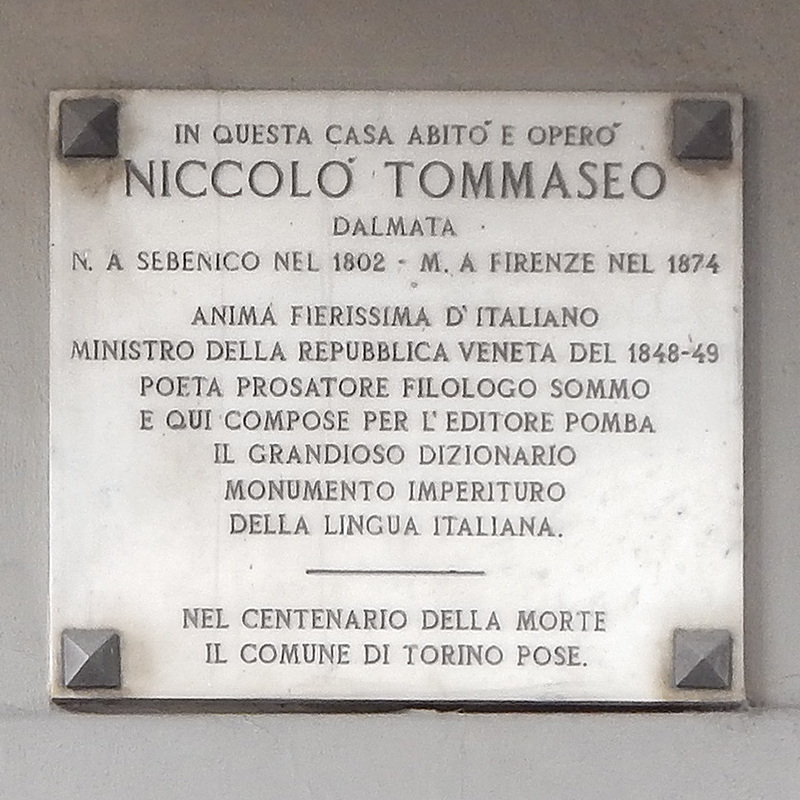 Un'immagine della Casa Scaccabarozzi, Torino